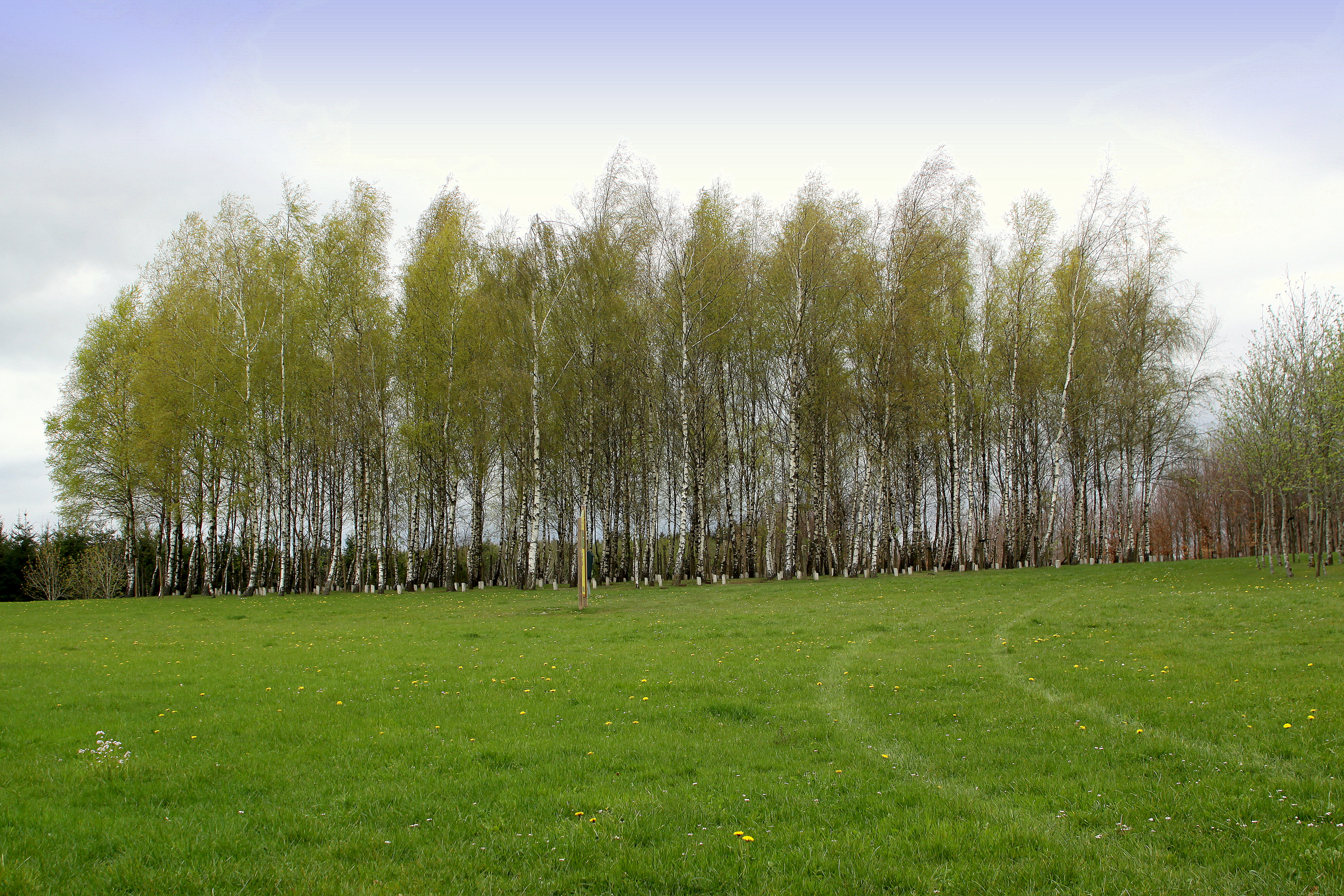 Een Deel vum Bois de la Paix